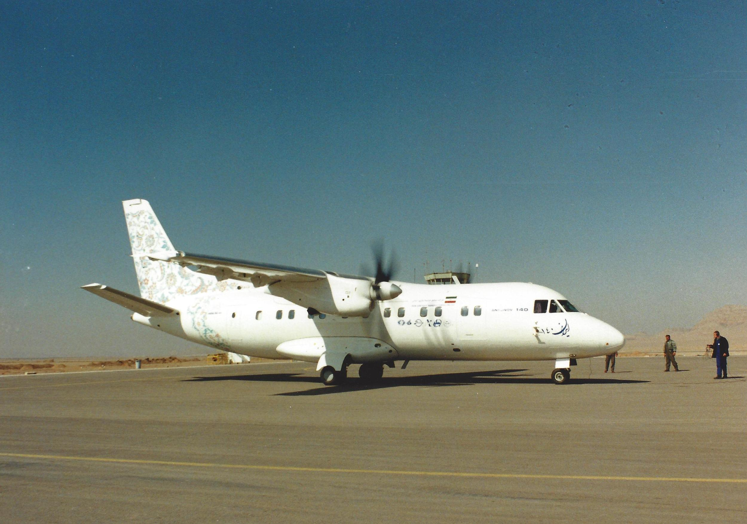 An-140 FIRST HESA SERIAL AIRCRAFT (IRAN FEB 2001)